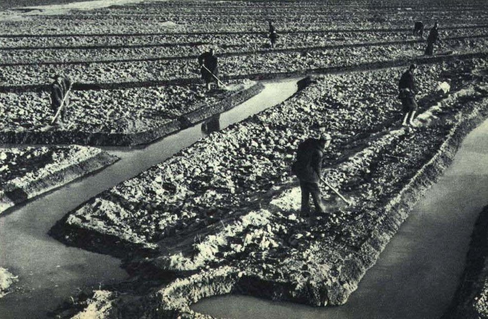 1963-03 1963年 吐鲁番县五星人民公社